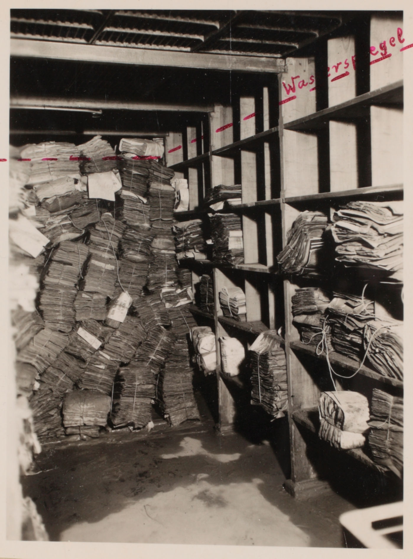 Überschwemmung des Hauptstaatsarchivs Hannover im Februar kurz nach dem Höchststand der Hochwasserkatastrophe 1946 ...